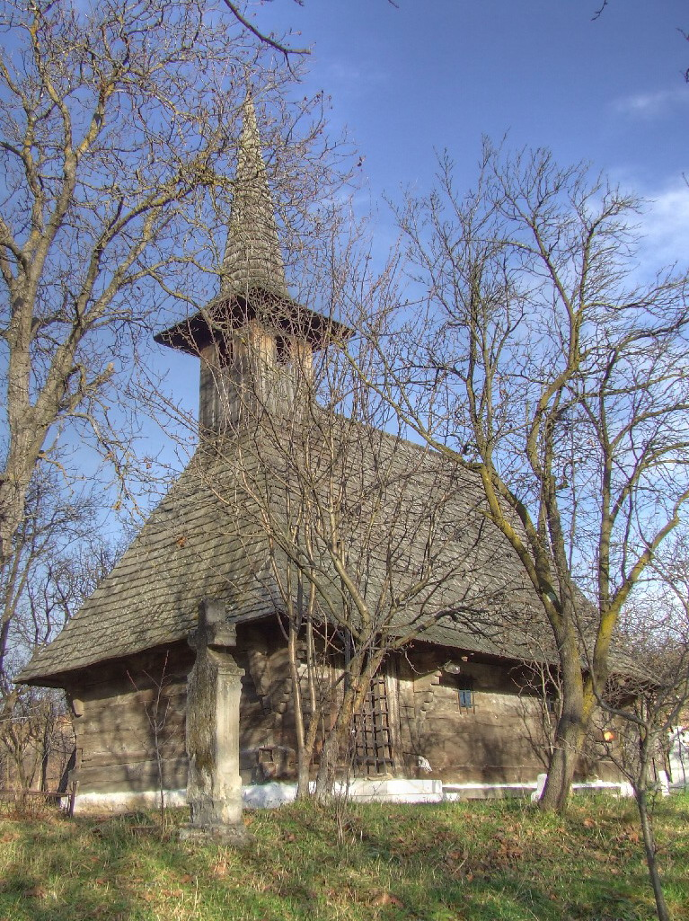 Biserica de lemn din Ticu, judeţul Cluj.